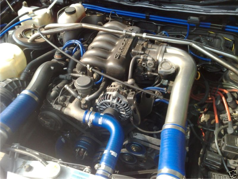 Motorraum des Eunos Cosmo mit 3-Scheiben-Wankelmotor. Typ 20B.